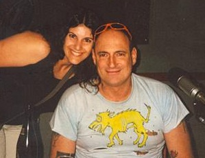 Carolina Bossa y Fernando Peña luego de la entrevista en El parquimetro - radio Metro 95.1